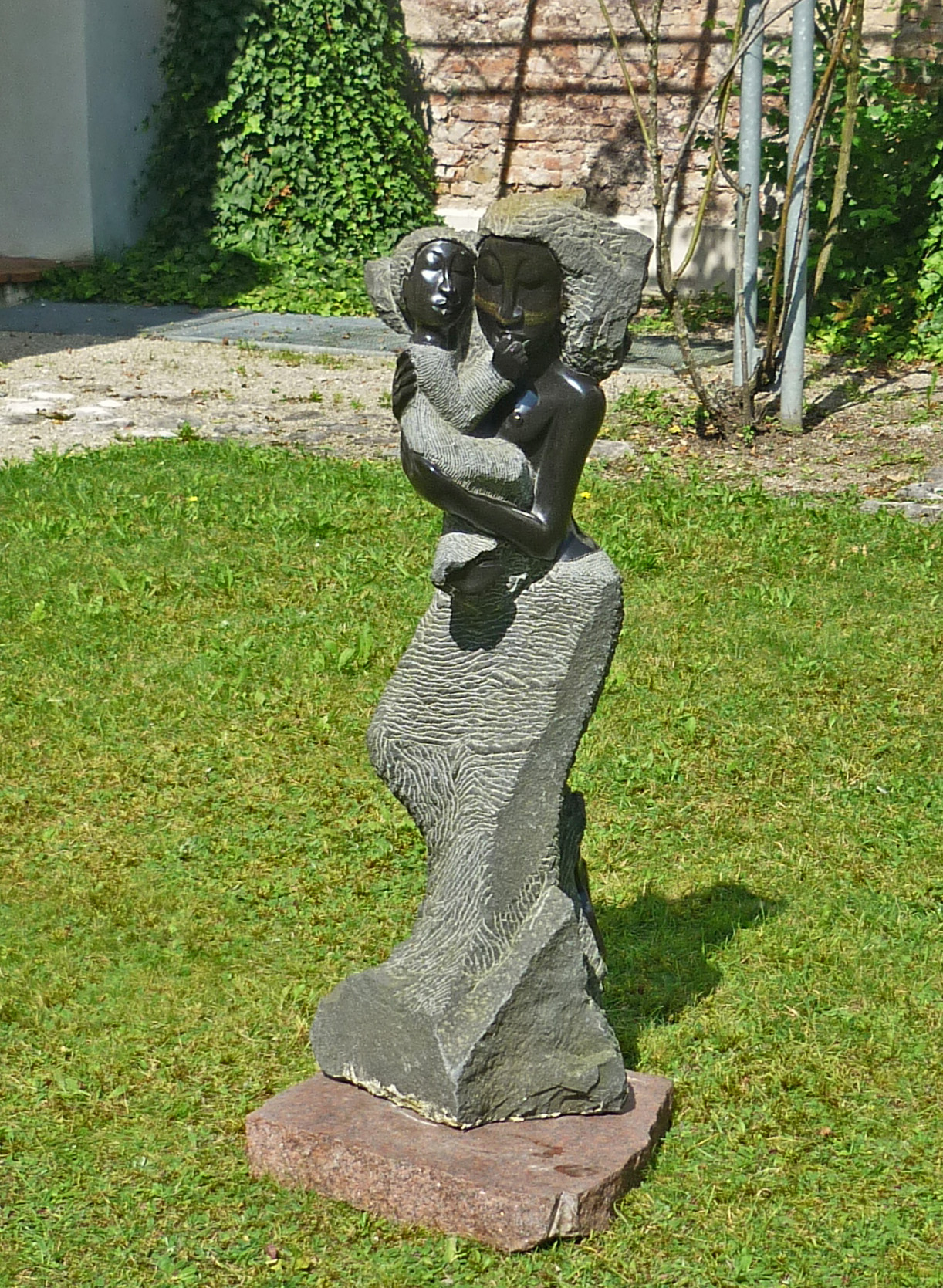 Skulptur von Washington Msonza (geb. 22.09.1966 in Domboshava/Mashonaland East, Simbabwe), aufgenommen im Kloster Benediktbeuern